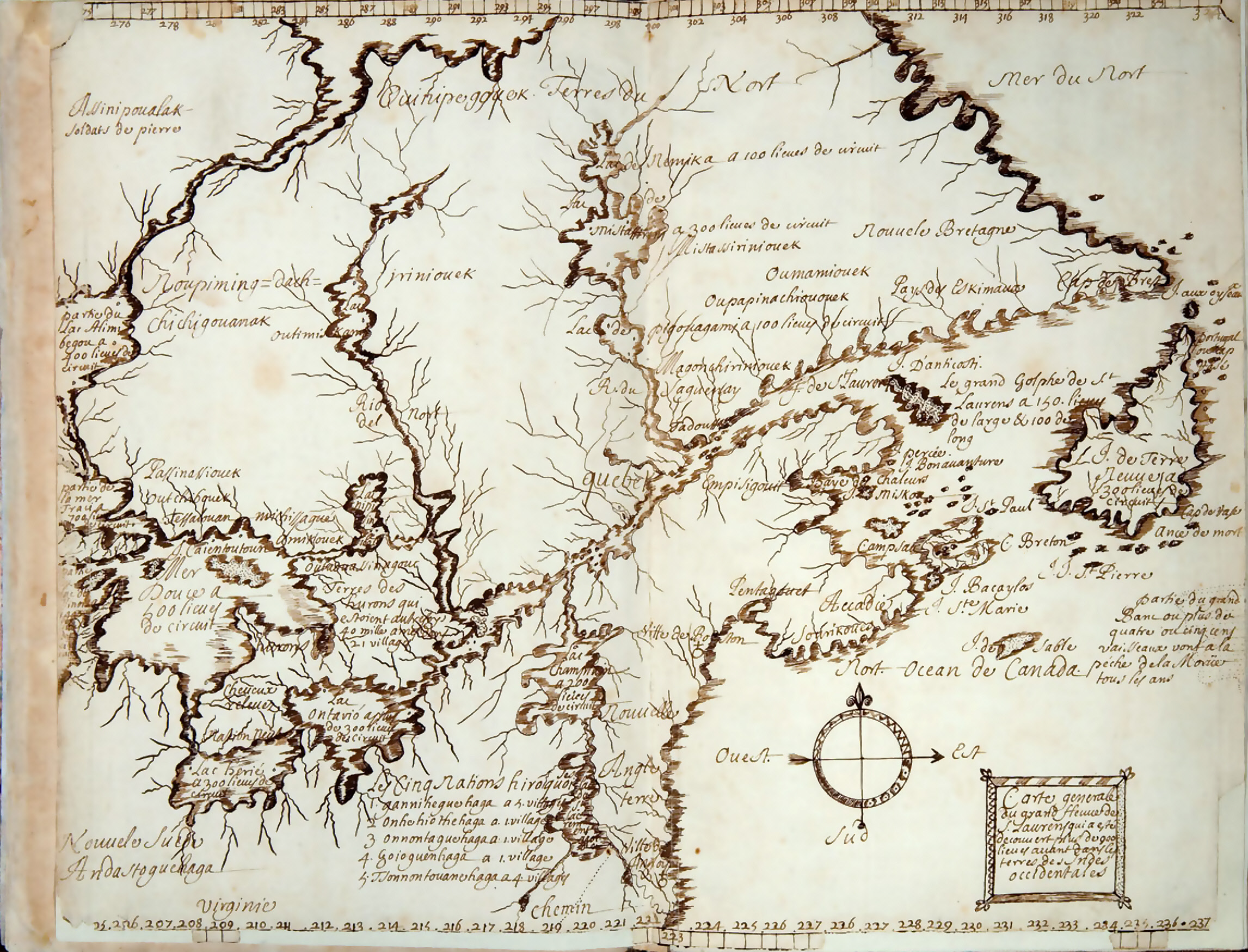 Codex canadensis Deuxième de couverture. (Gilcrease Museum)